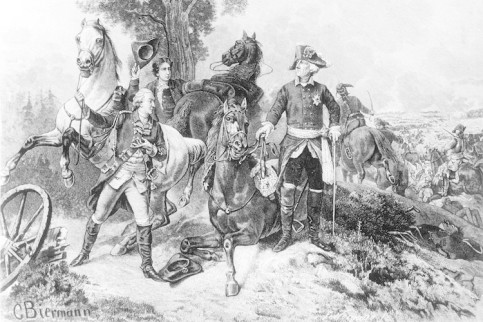 Federico II negandose a huir